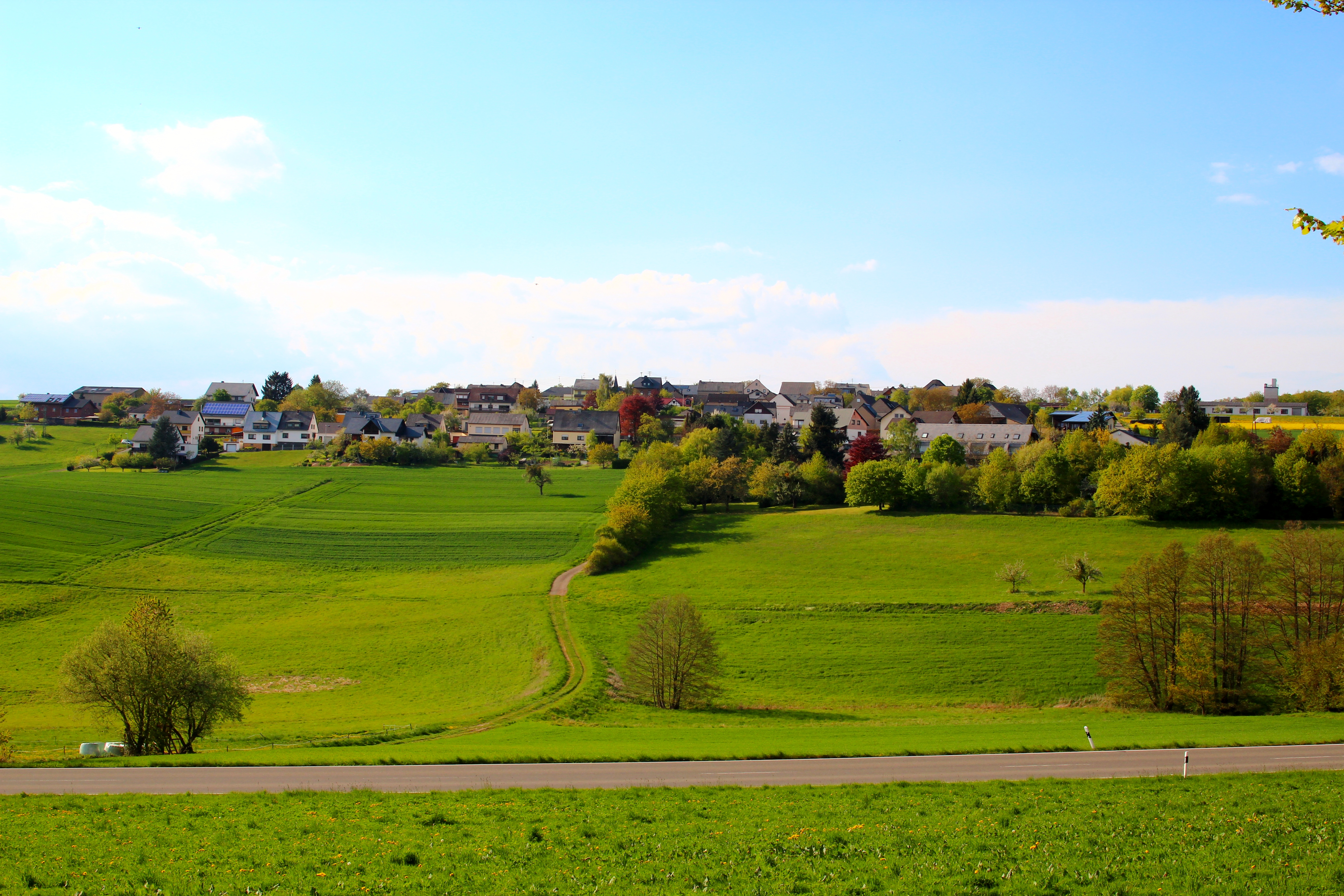 Ortsansicht der Ortsgemeinde Eschbach bei Nastätten selbst fotografiert von Carsten Göller, 21-04-2014